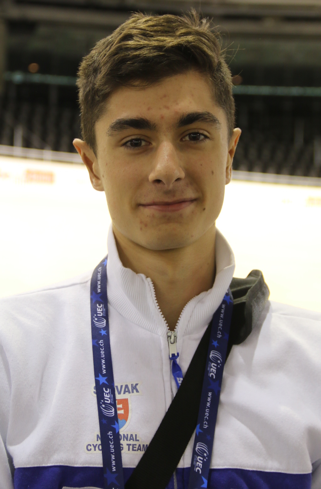 Andrej Strmiska, slowakischer Radsportler